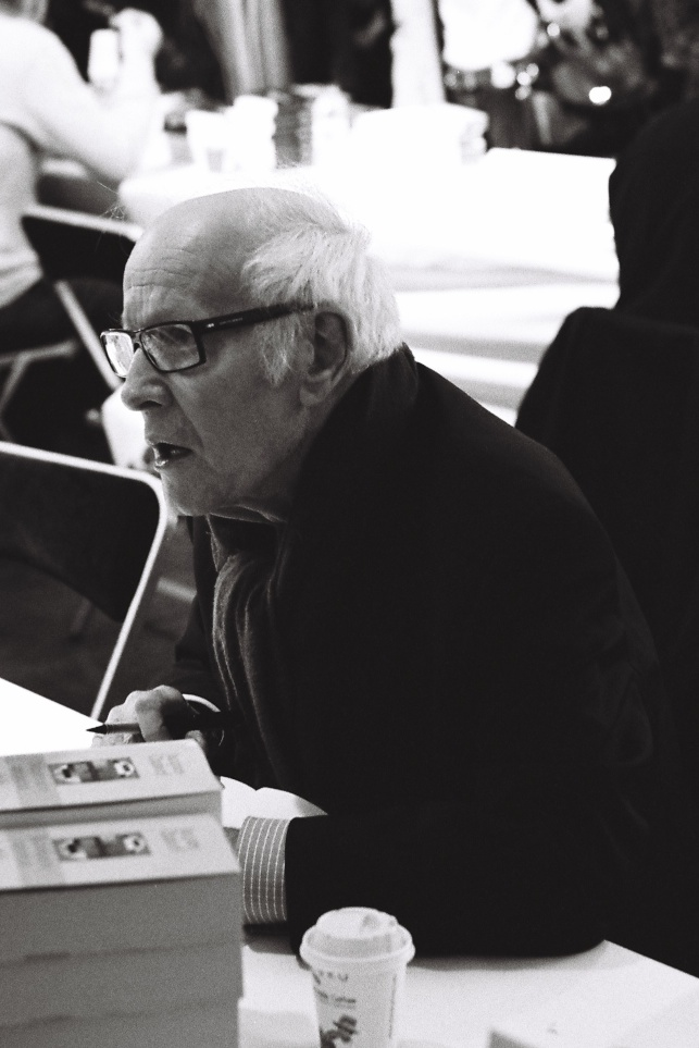 Jacques Chancel au salon du livre Radio France, 26 novembre 2011